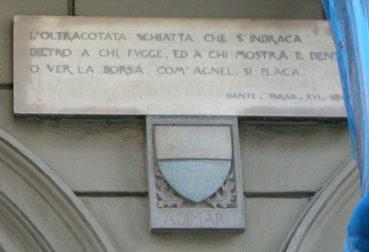 Via delle oche, lapide adimari